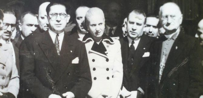 El gobernador de Tucumán, Pedro Fernando Riera recibe a Eva Perón, junto al obispo de Tucumán, Agustín Barrére y otras autoridades.